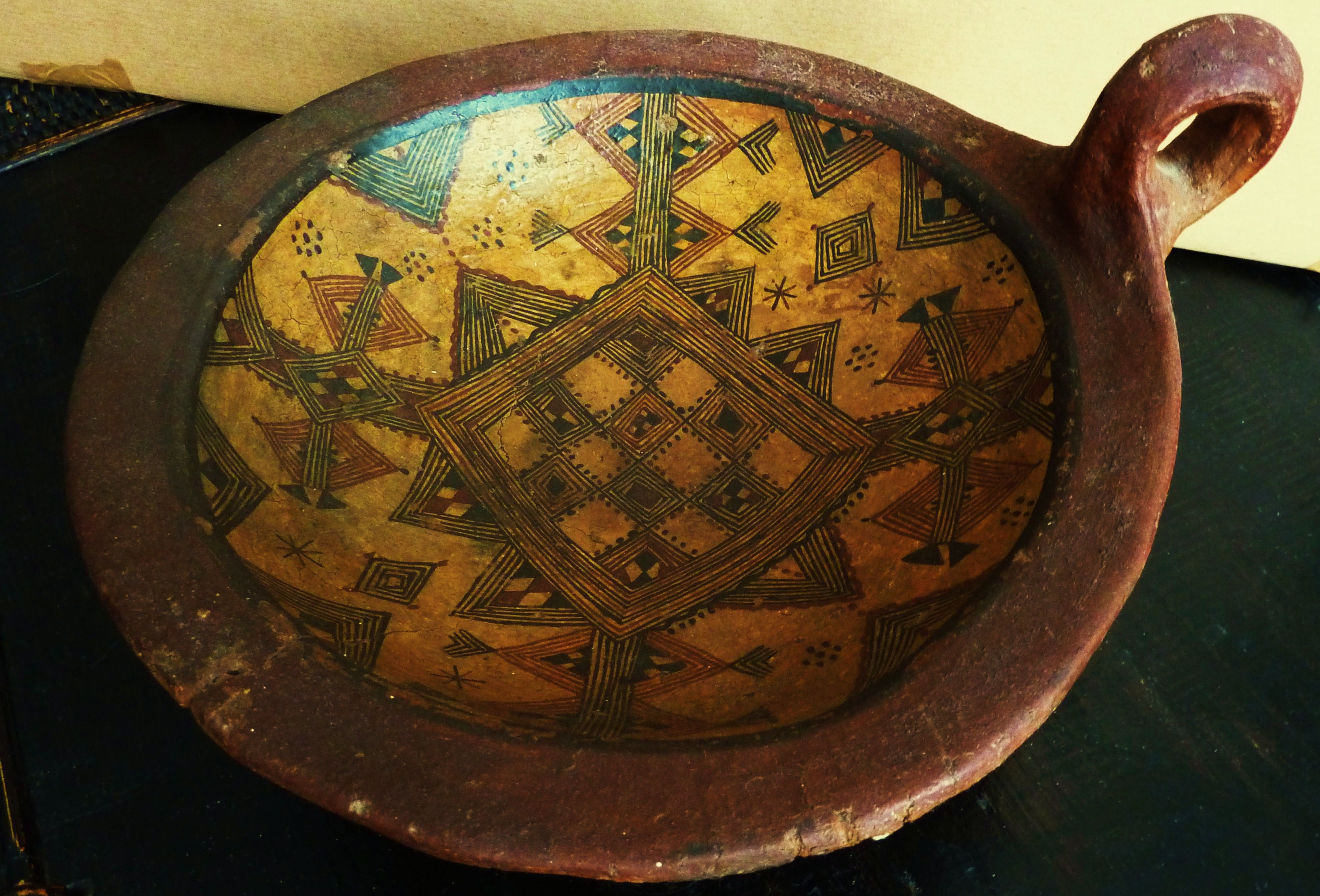 Plat traditionnel de Kabylie, Algérie, vers 1970